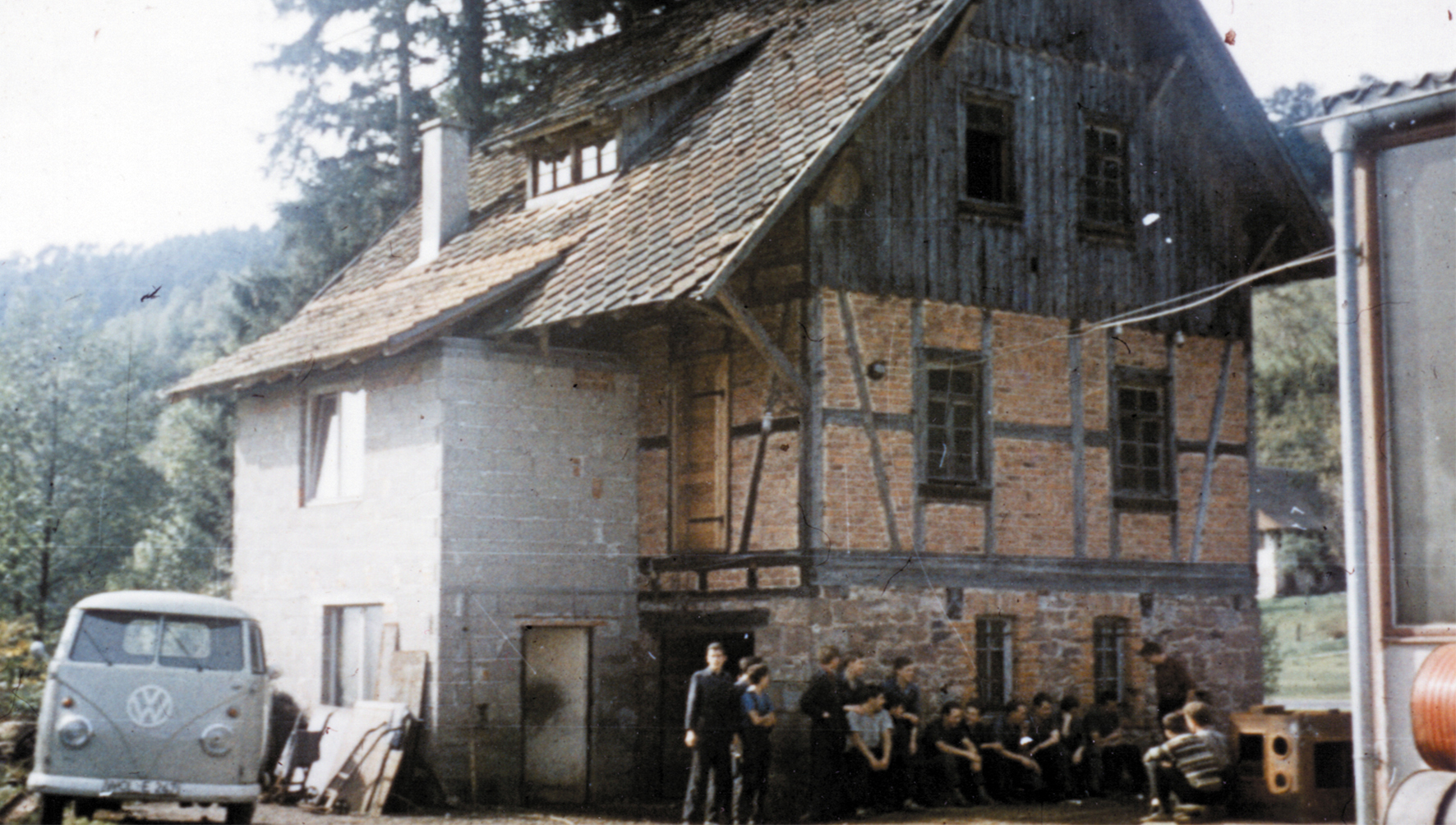 Getreidemühle im Nordrach